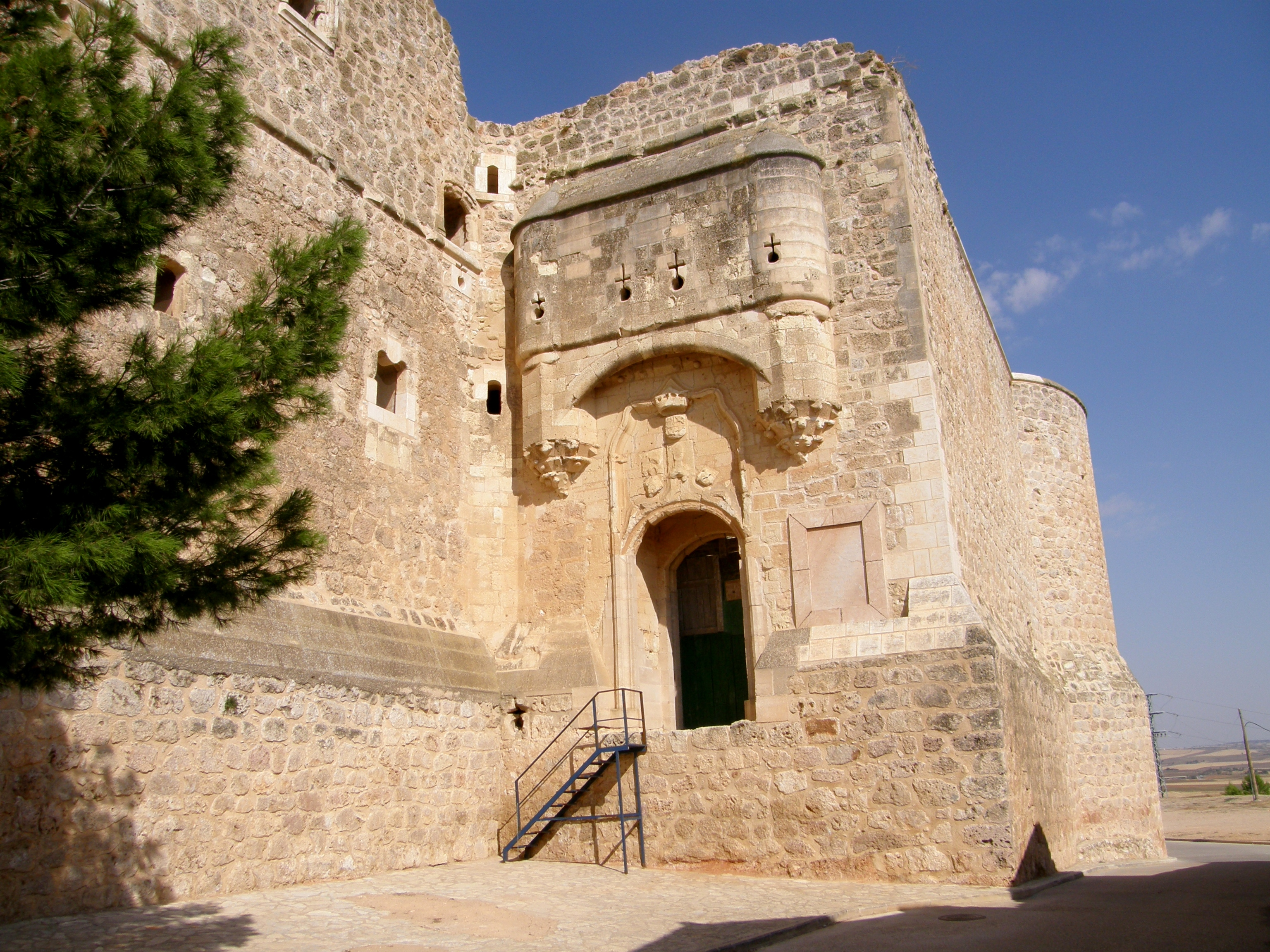 castillogarcimuñoz